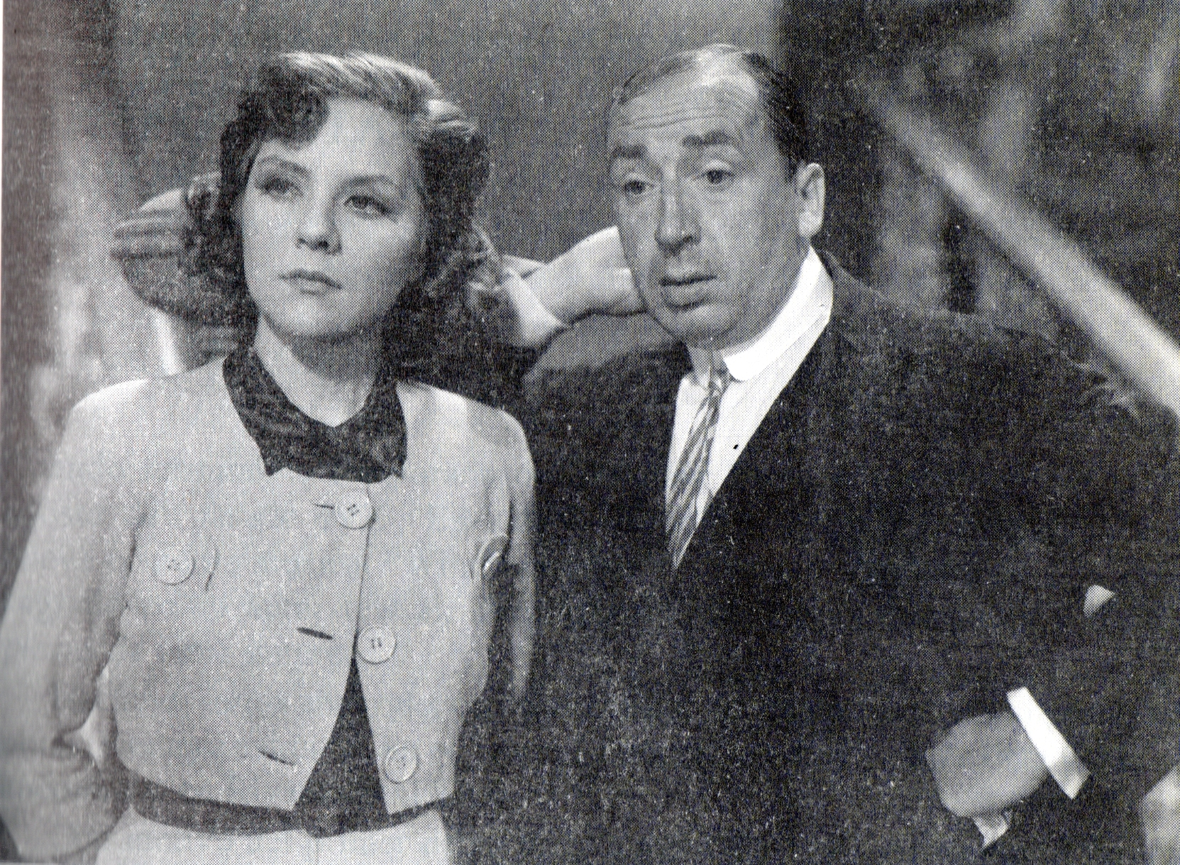 Amelia Bence y Pepe Arias en una de sus películas, principios de los años de 1940.